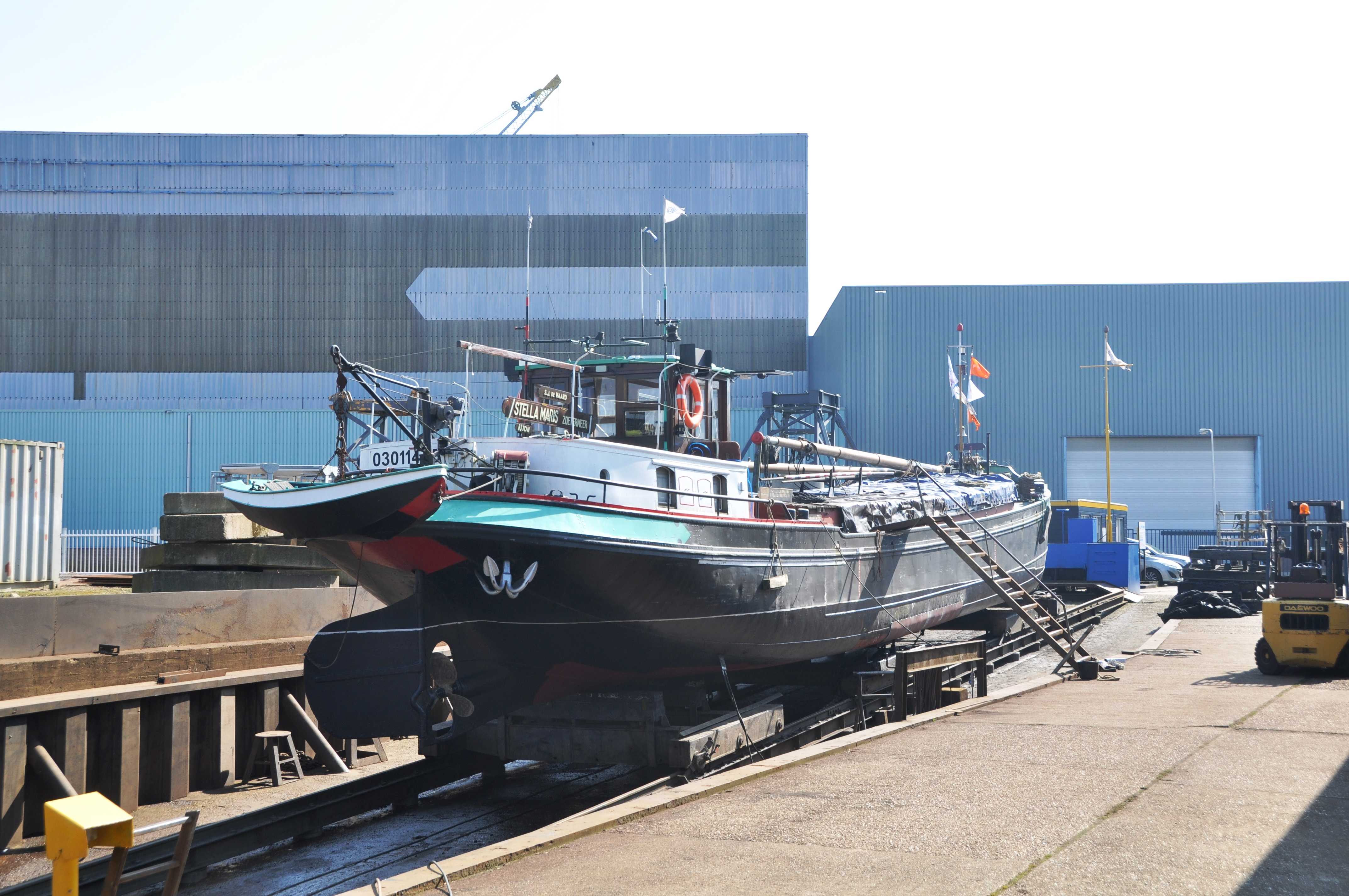 Hellingbeurt van de STELLA MARIS bij scheepswerf Het Anker in Hendrik Ido Ambacht.